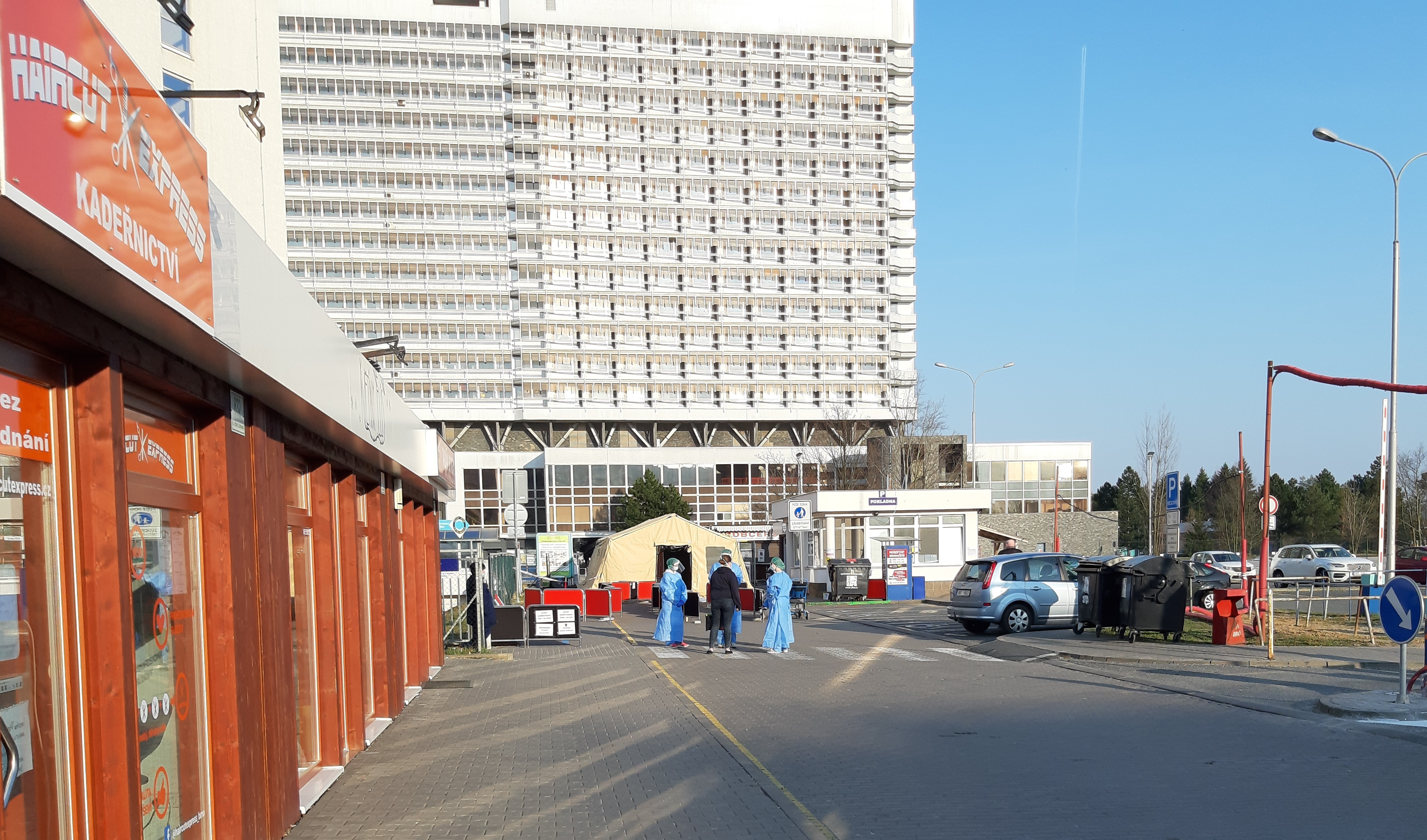 Vstup do Nemocnice Bohunice v časech K-viru.